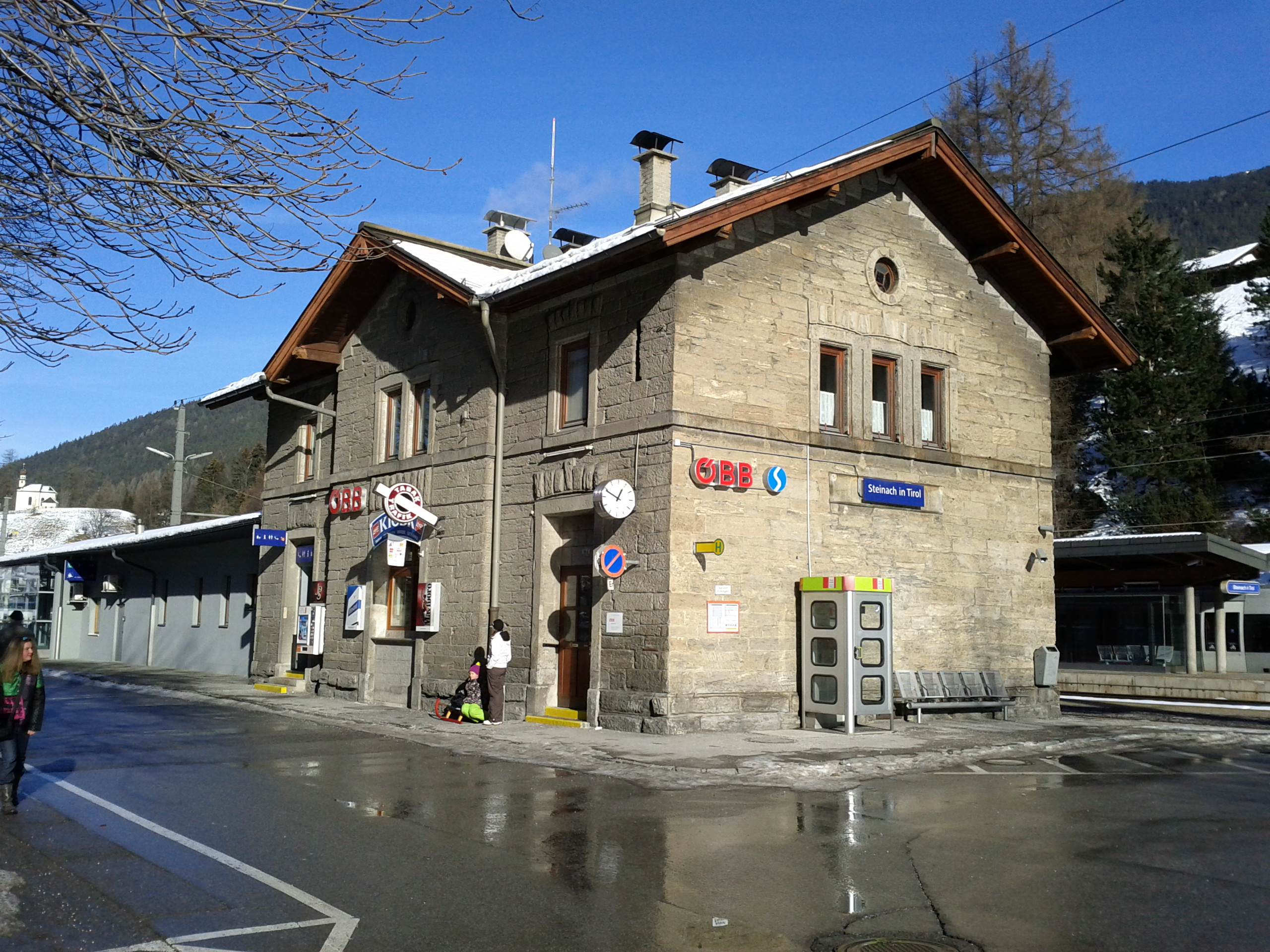 Aufnahmsgebäude - Steinach am Brenner, Bahnhofstraße 167